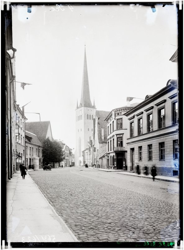 Lai tänav Oleviste kirikuga, fotonegatiiv